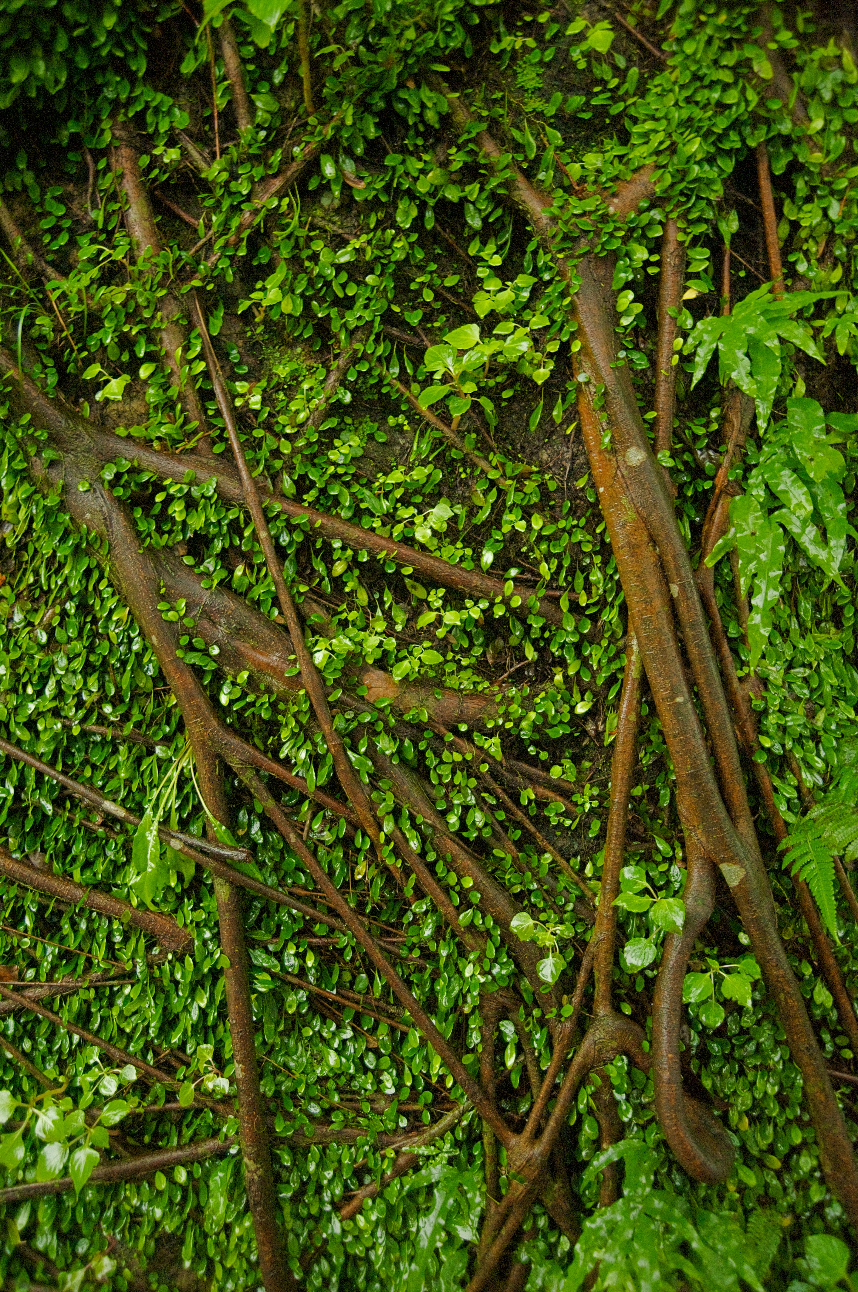 金瓜石